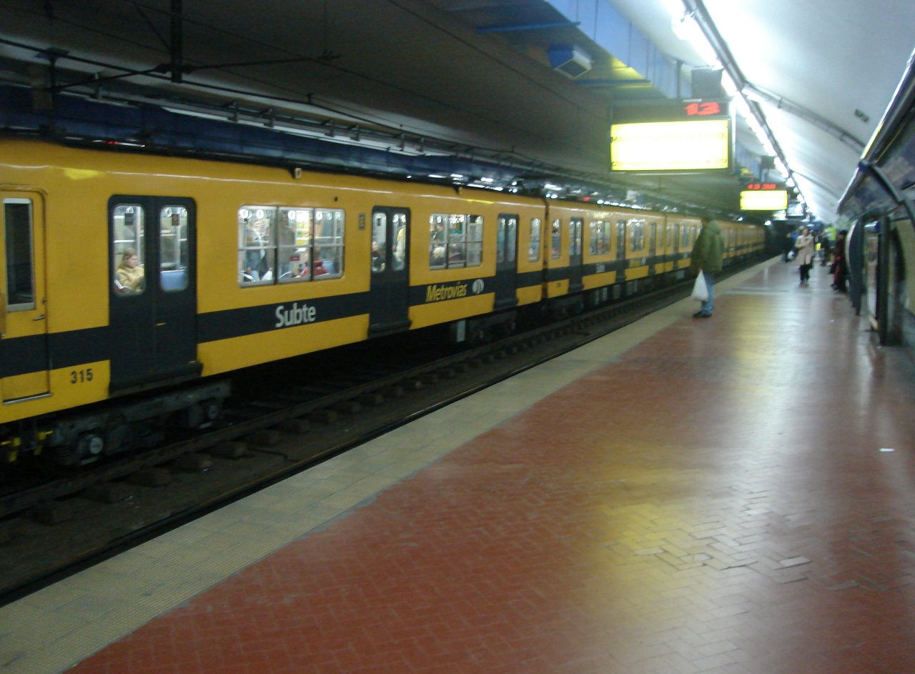 Vista de la estación Diagonal Norte de la red de subterráneos de la Ciudad de Buenos Aires desde el extremo norte del andén a Retiro